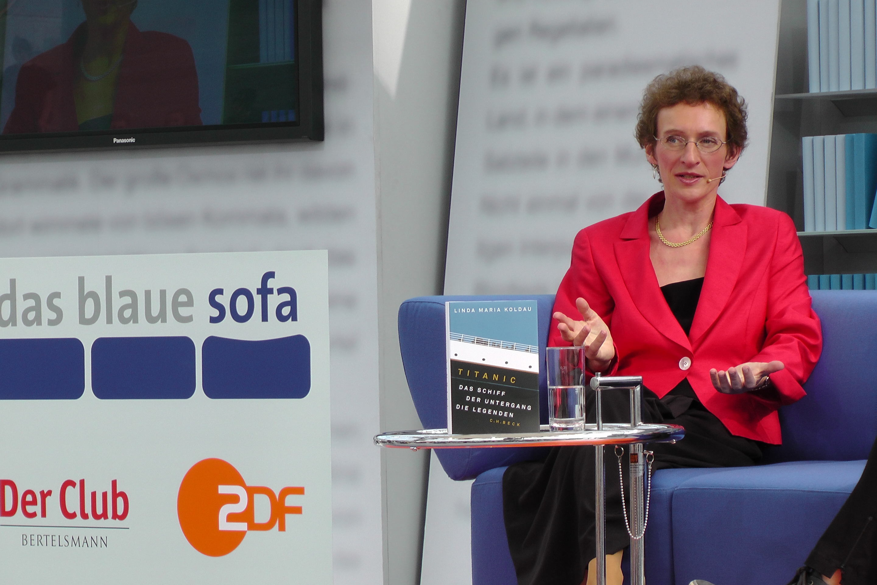 Diese Fotos dürfen Sie honorarfrei nutzen, wenn Sie folgenden credit beachten: Copyright: Das blaue Sofa / Club Bertelsmann. Koldau, Linda Maria: Titanic C.H. Beck | Moderation: Marie Sagenschneider Montag, 15. April 1912: Die Titanic zerbricht drei Stunden nach der Kollision mit einem Eisberg und sinkt. Nur rund 700 der 2.200 Passagiere überleben. Aus Gründen der Haftung werden die Umstände der Katastrophe verschleiert, schnell überdecken Legenden das wahre Geschehen. Linda Maria Koldau hat die Dokumente über den Untergang neu gesichtet. Sie lässt die letzten Stunden auf dem schwimmenden Luxushotel lebendig werden und zeigt, wo die Legenden, Filme und Romane zum Untergang der Titanic an die Realität anknüpfen. Sie erklärt, was wir über den Luxusdampfer, seine Passagiere, die Umstände des Untergangs und das Wrack tatsächlich wissen. Linda Maria Koldau, Kulturwissenschaftlerin und Journalistin, ist Professorin für Musikwissenschaft und Kulturgeschichte an der Universität Aarhus in Dänemark. Einem größeren Publikum ist sie durch Artikel in der FAZ und zahlreiche Radiosendungen bekannt.